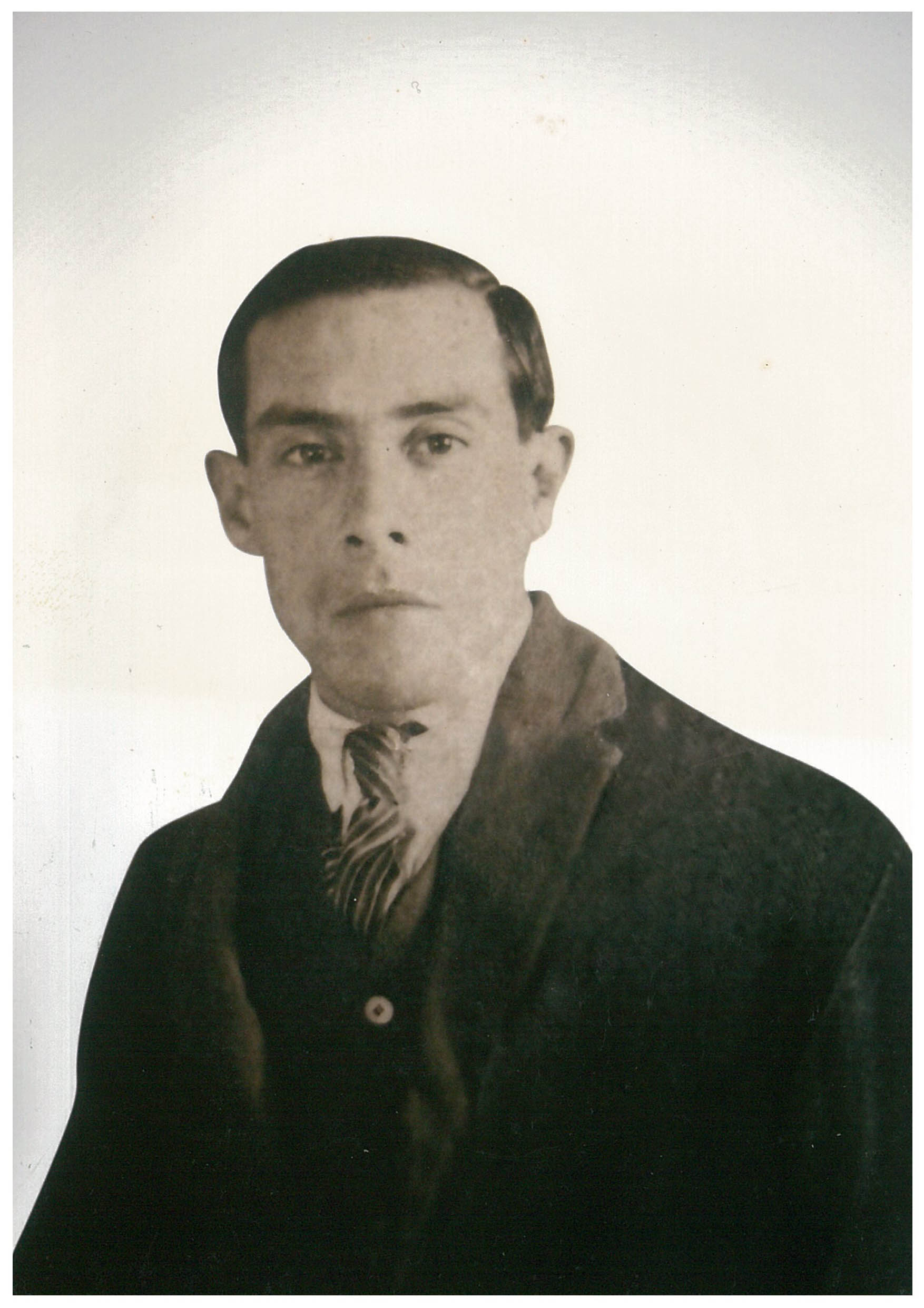 Julio Felipe Federico Pinglo Alva (Lima, Perú; 18 de julio de 1899 - 13 de mayo de 1936), conocido como «el bardo inmortal», fue un destacado compositor peruano, considerado uno de los máximos exponentes de la música criolla, poseedor de un estilo de amplio arraigo popular que enriqueció el acervo musical peruano. Es también conocido internacionalmente por ser el autor del vals «El plebeyo».